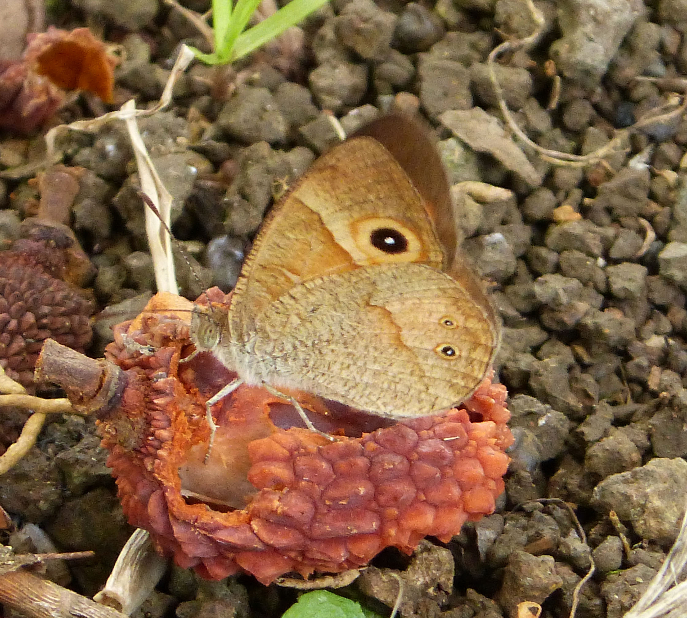 Henotesia narcissus narcissus